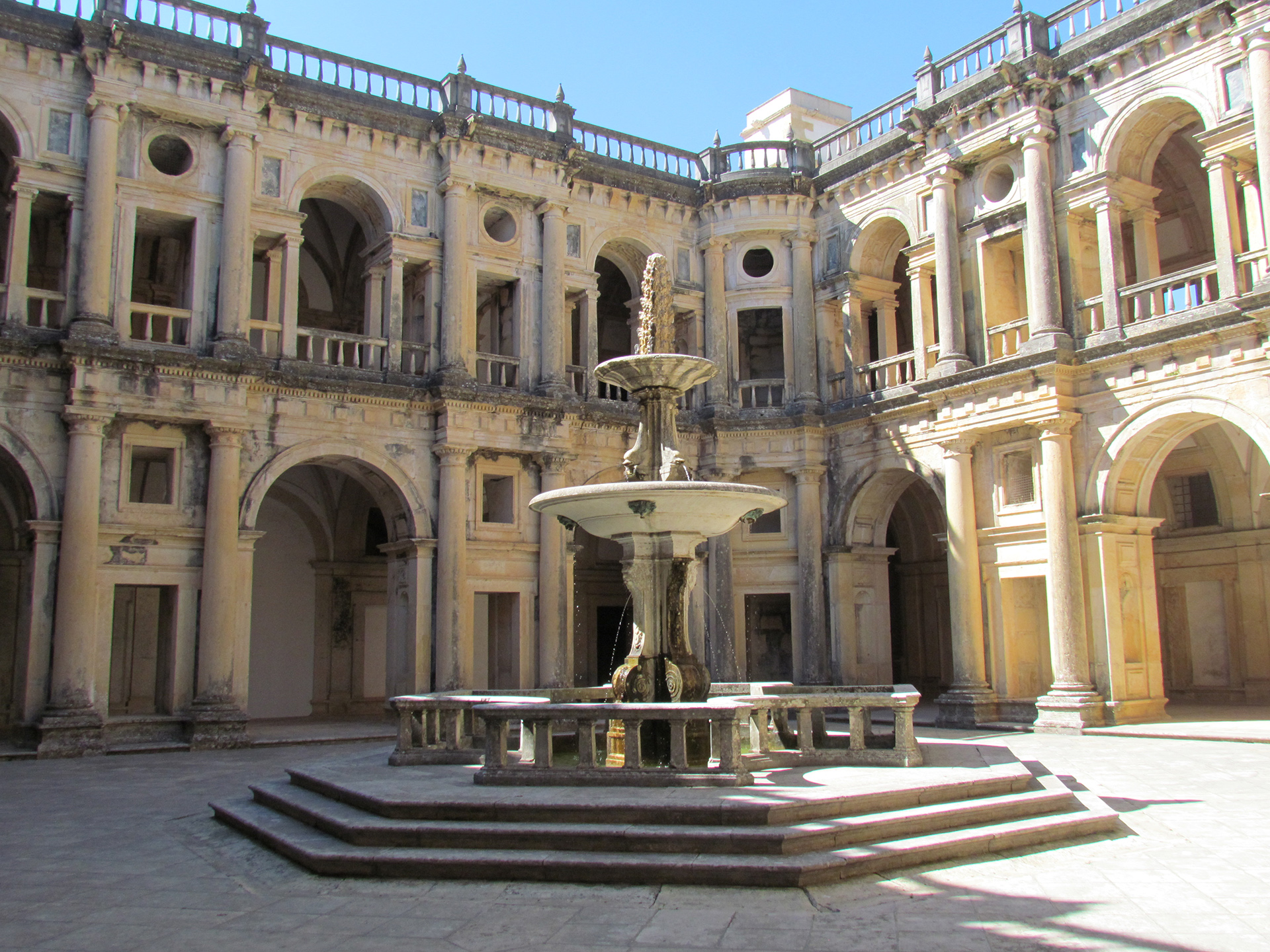 Castelo dos Templários - Tomar